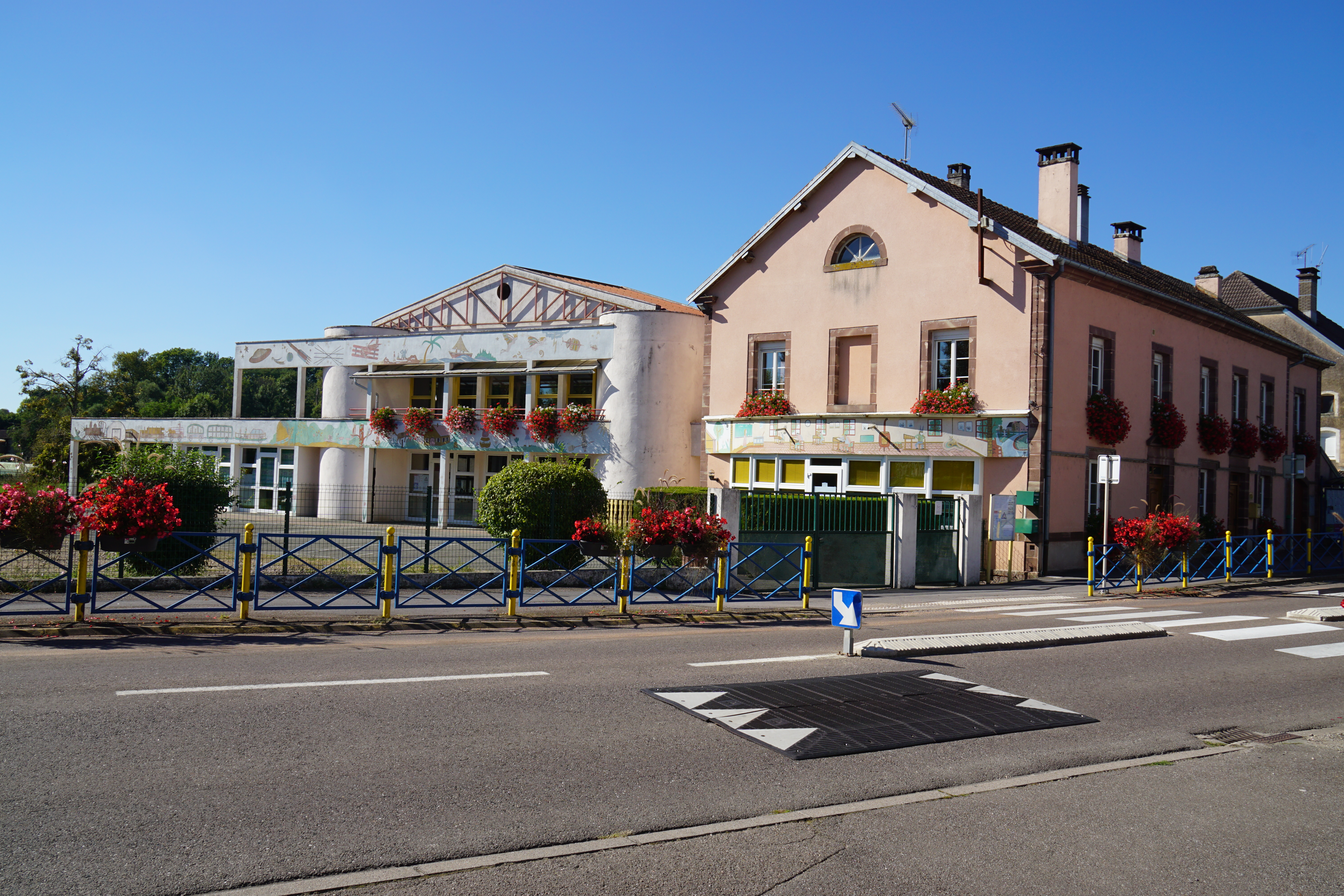 La mairie-école de Magnoncourt.